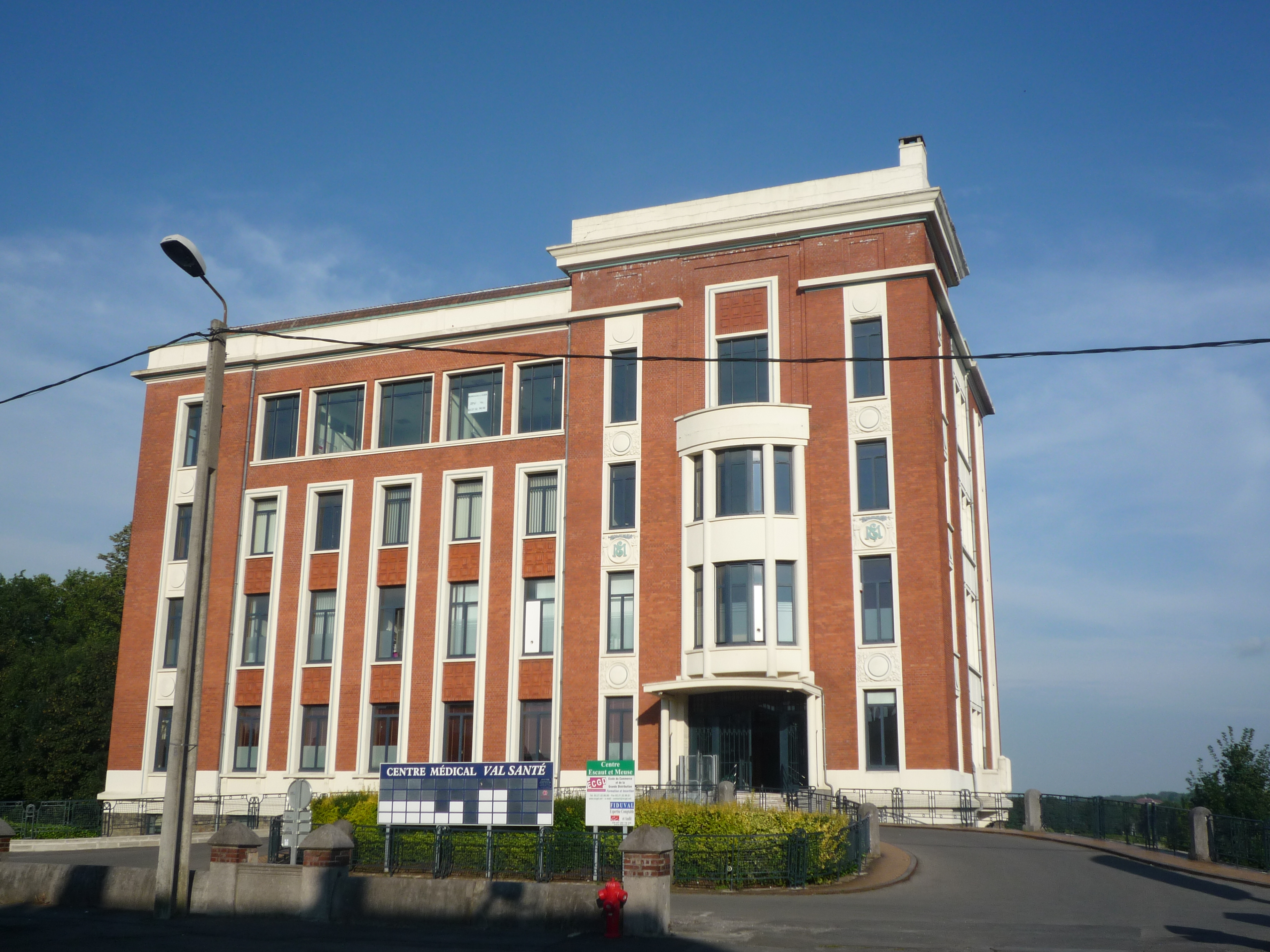 Anzin, Nord, Nord-Pas-de-Calais, France.